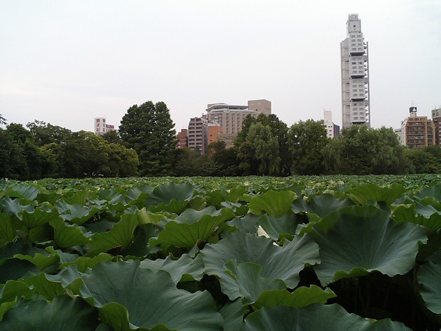 いつもここはシュールな場所だと思う。不忍池